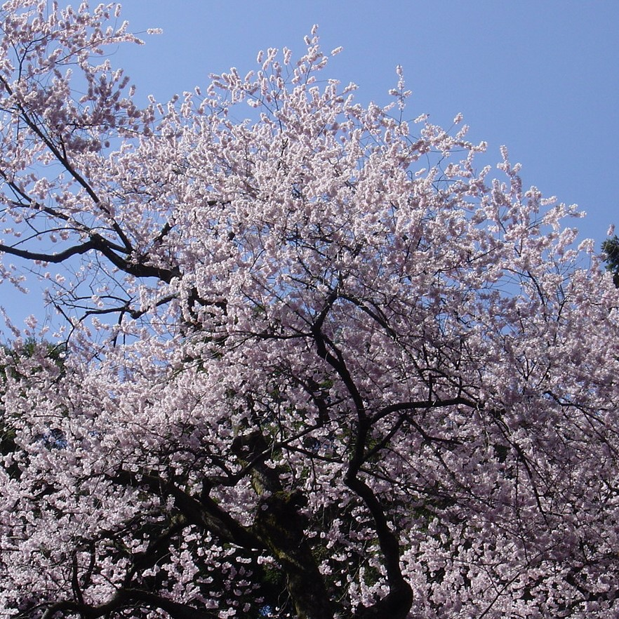 2012年、福智山麓の虎尾桜を撮影。